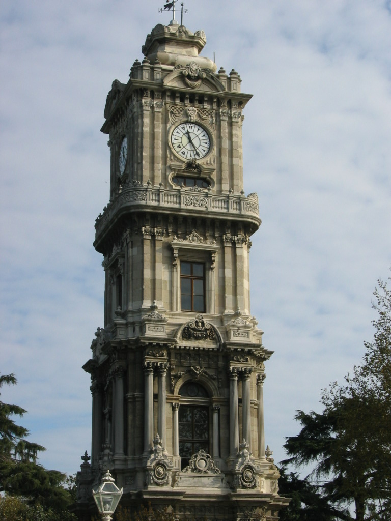 Kategori:İstanbul resimleri